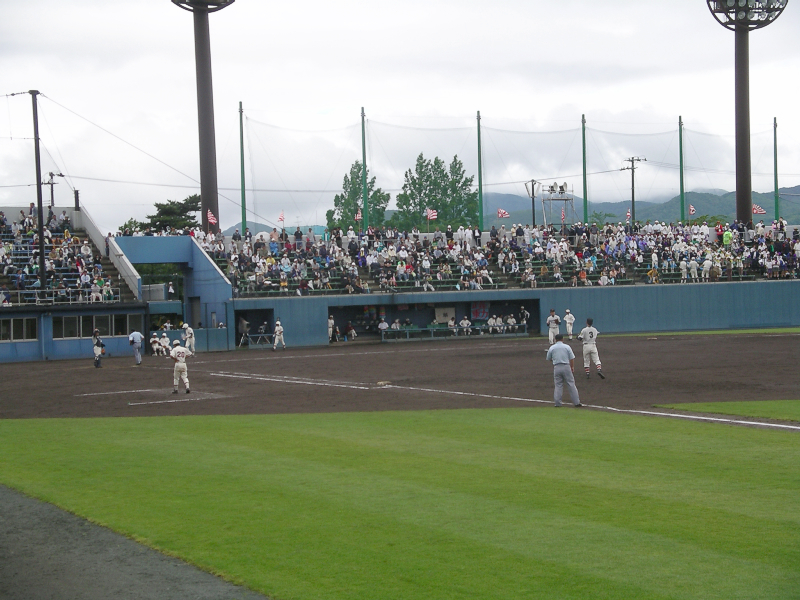 2006年全国高校野球選手権・青森県予選（東奥義塾対八戸工業）